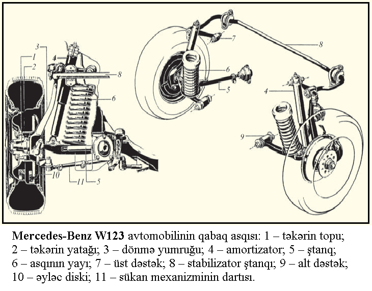 Mercedes-Benz W123 avtomobilinin qabaq asqısı